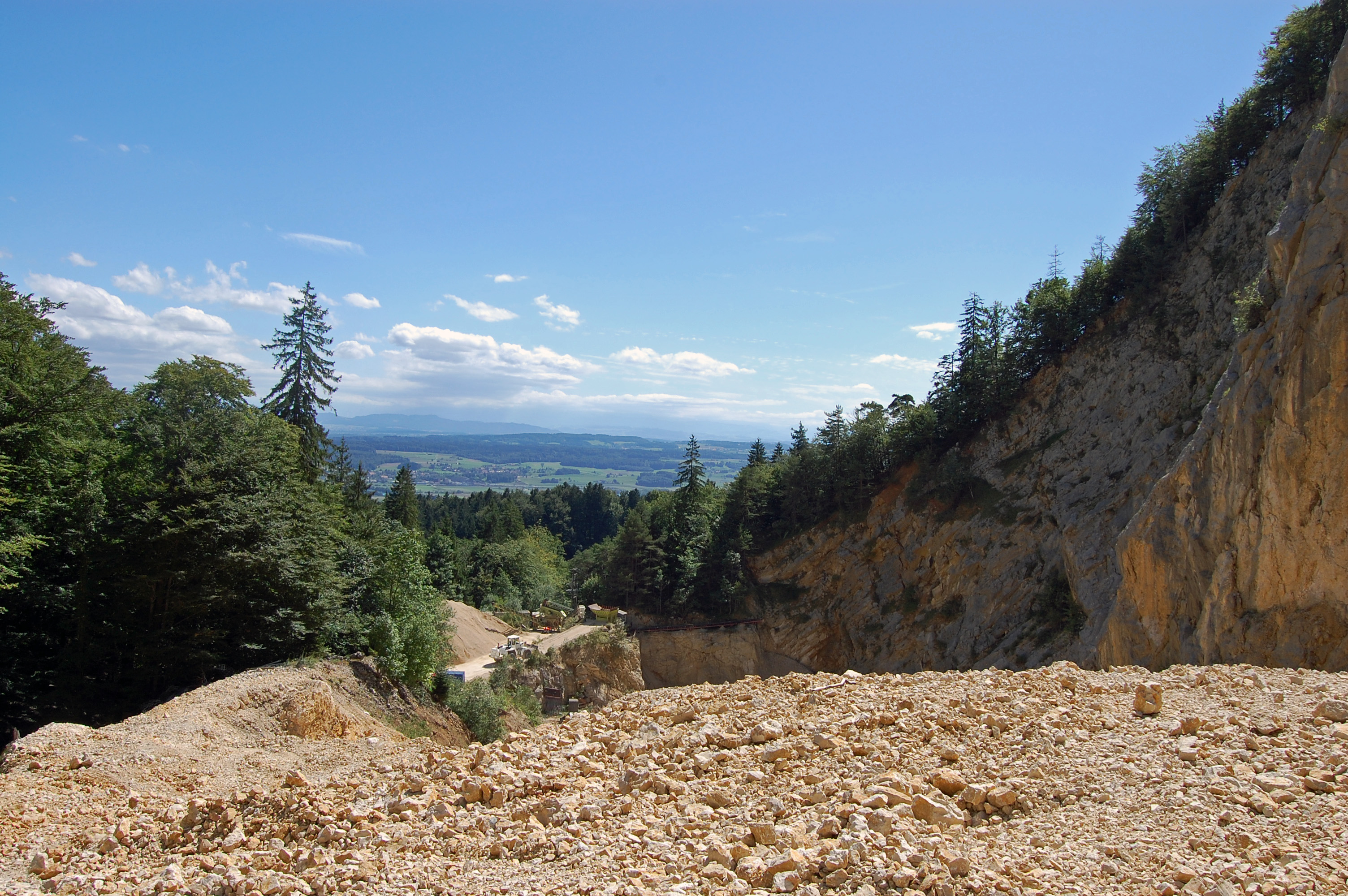 Ein Steinbruch in Oberdorf. Er ist am Wanderweg von Oberdorf zum Weissenstein gelegen. In ihm werden Jurakalksteine und Mergel gewonnen.